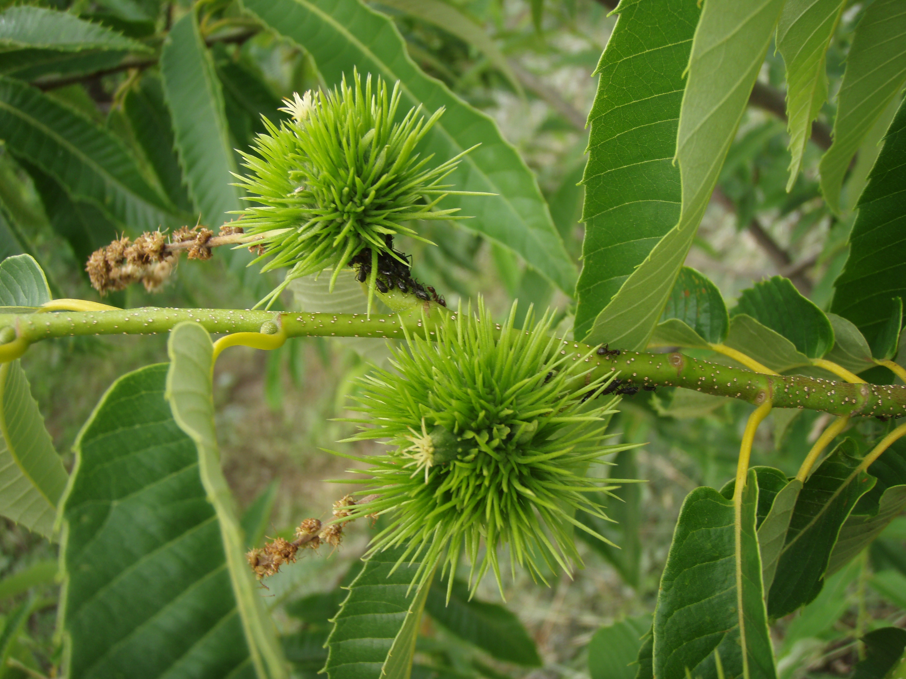 受粉に成功した雌花 (Nagano pref. Japan)